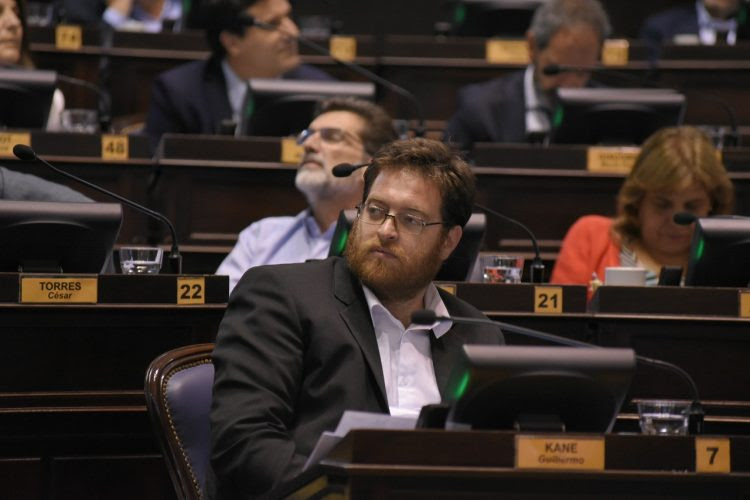 Guillermo Kane en su banca de la Honorable Cámara de Diputados de la Provincia de Buenos Aires